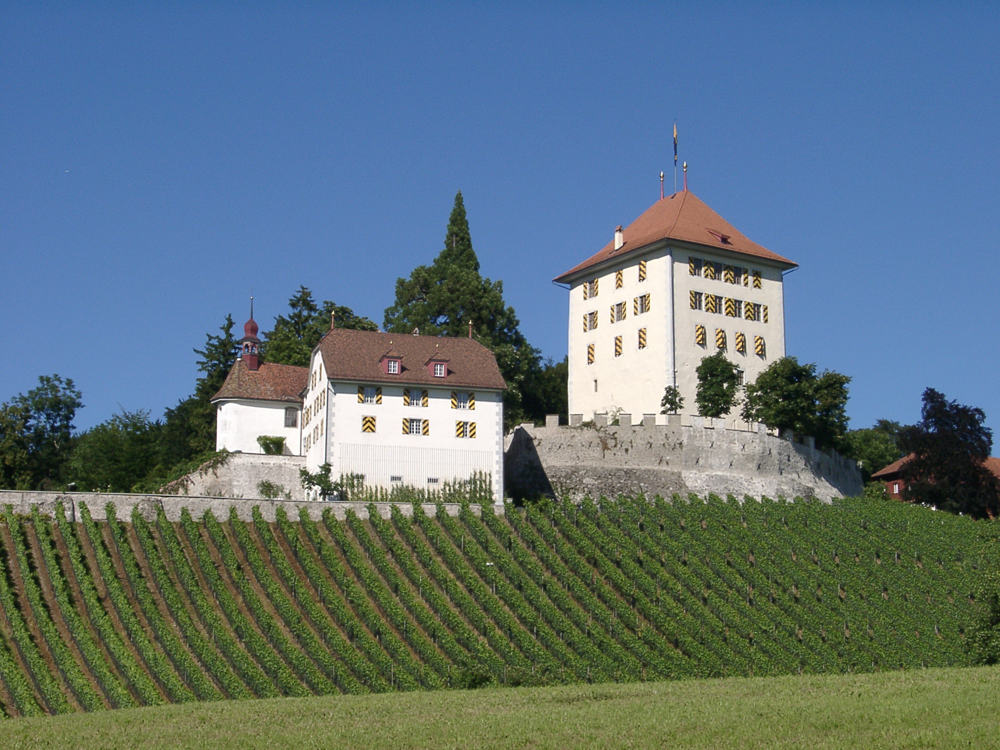 Schloss Heidegg, Gelfingen/CH